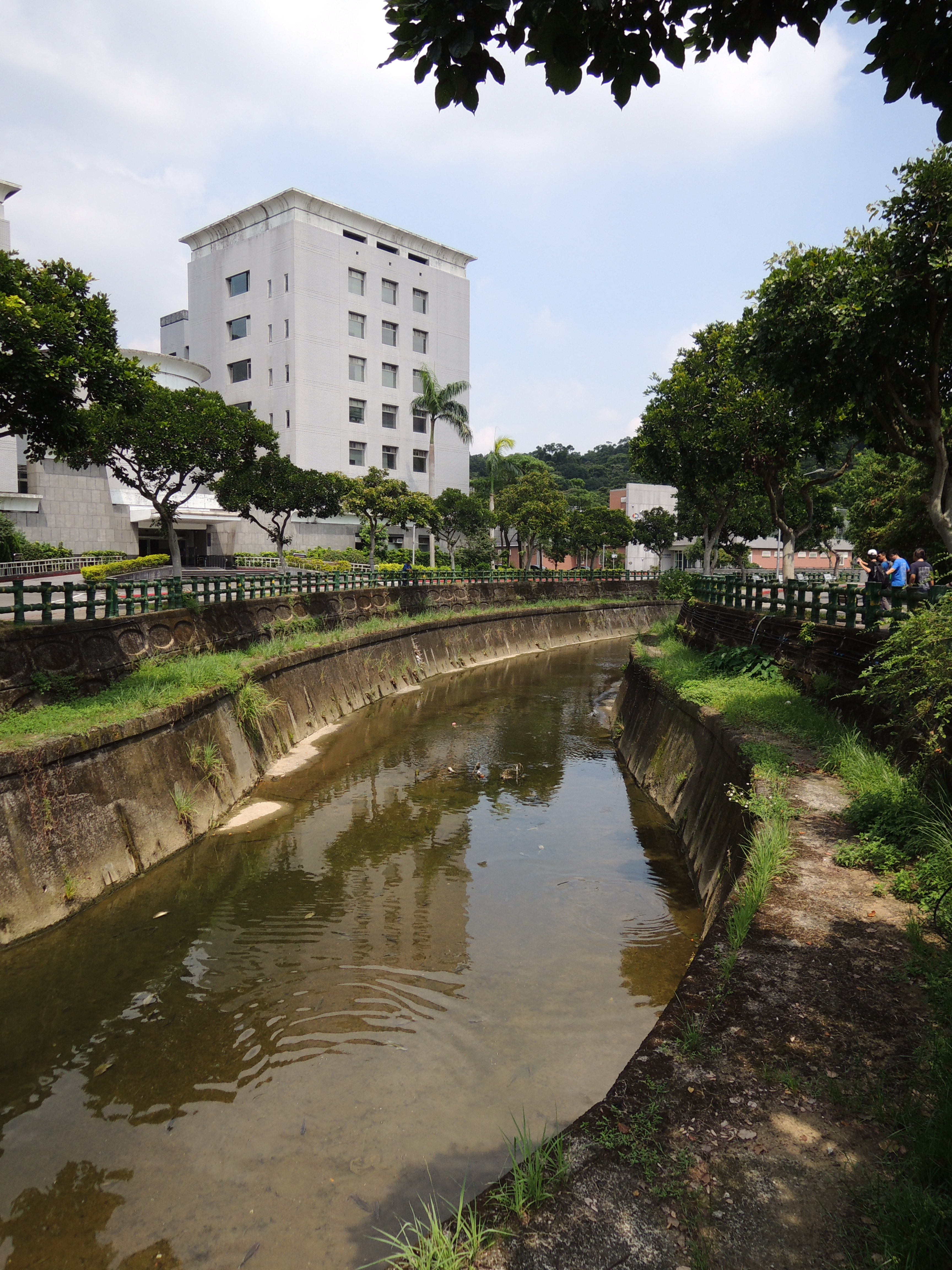 中央研究院內四分溪下游。照片內白色建築為中國文哲研究所。